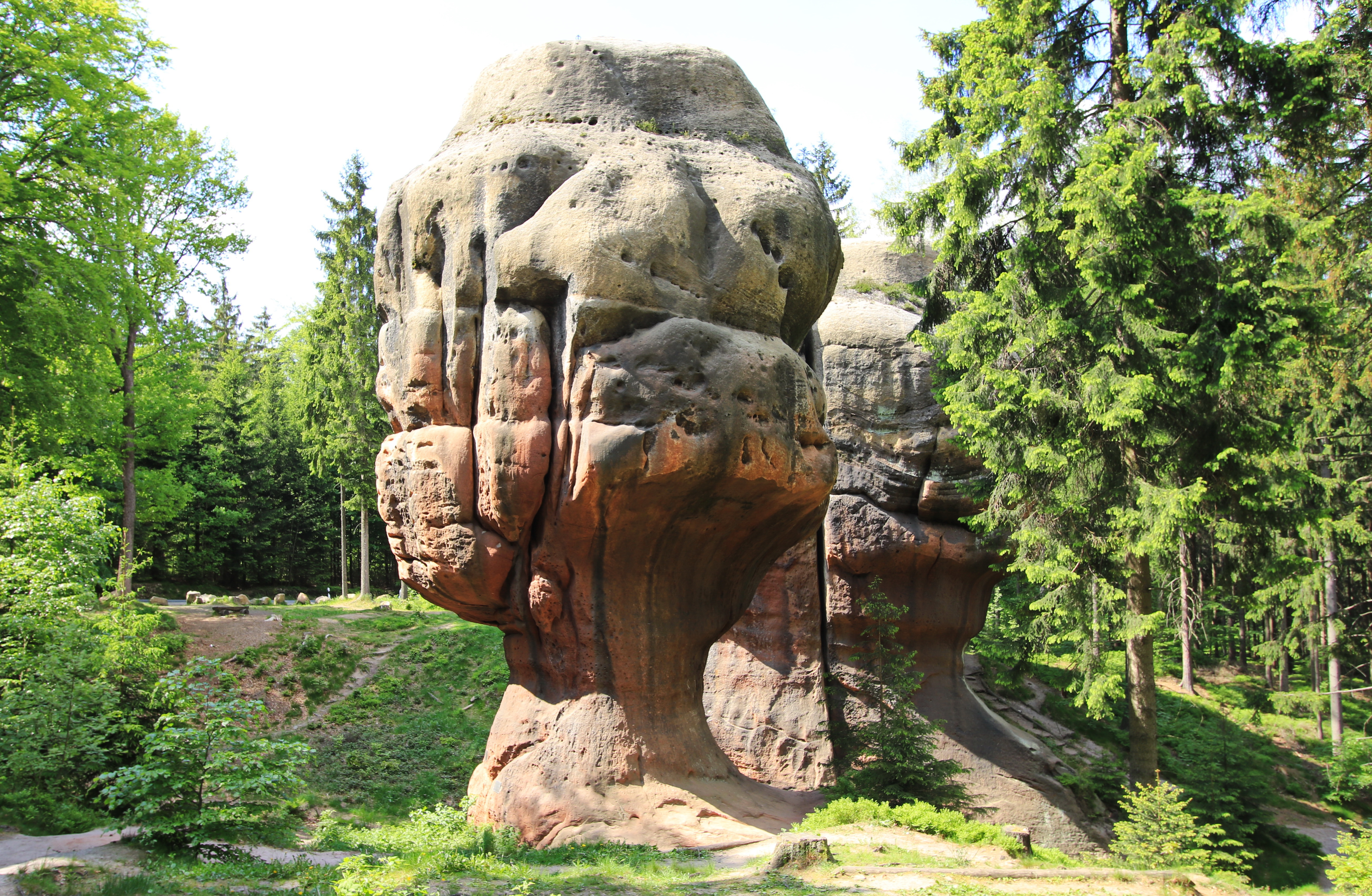 Naturdenkmal Kelchsteine bei Oybin im Naturpark Zittauer Gebirge in Sachsen.